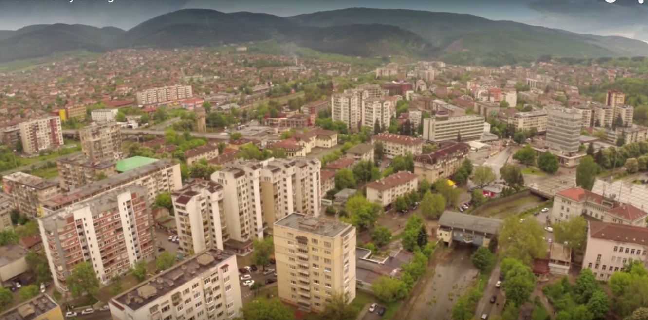 Квартали, Перник